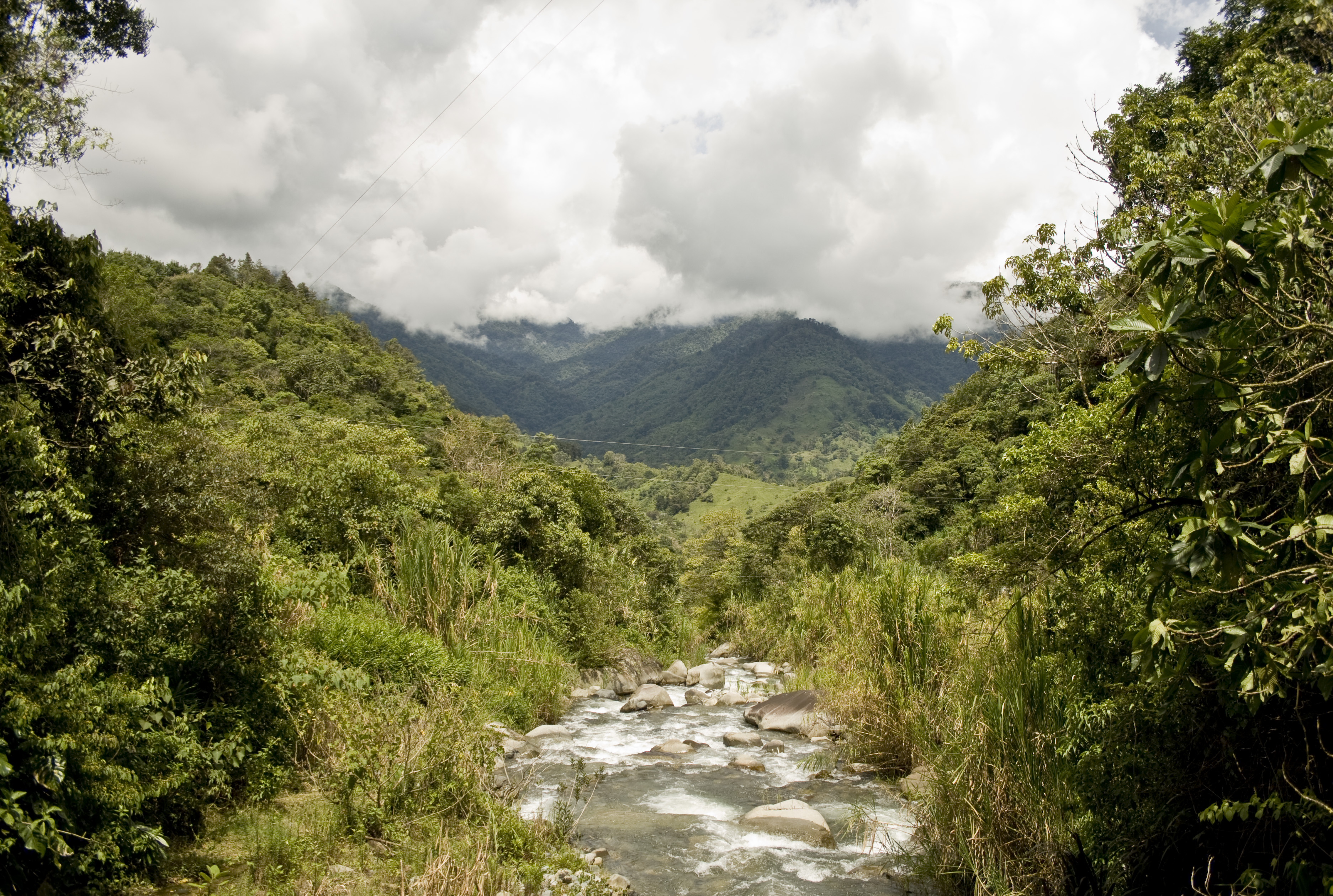 Río Blanco. Distrito de Rivas, cantón de Pérez Zeledón, provincia de San José, Costa Rica.